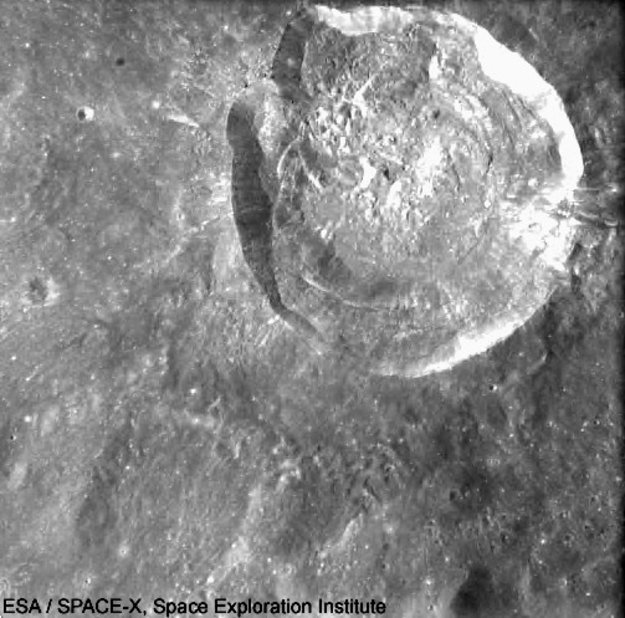 格鲁什科陨石坑照片